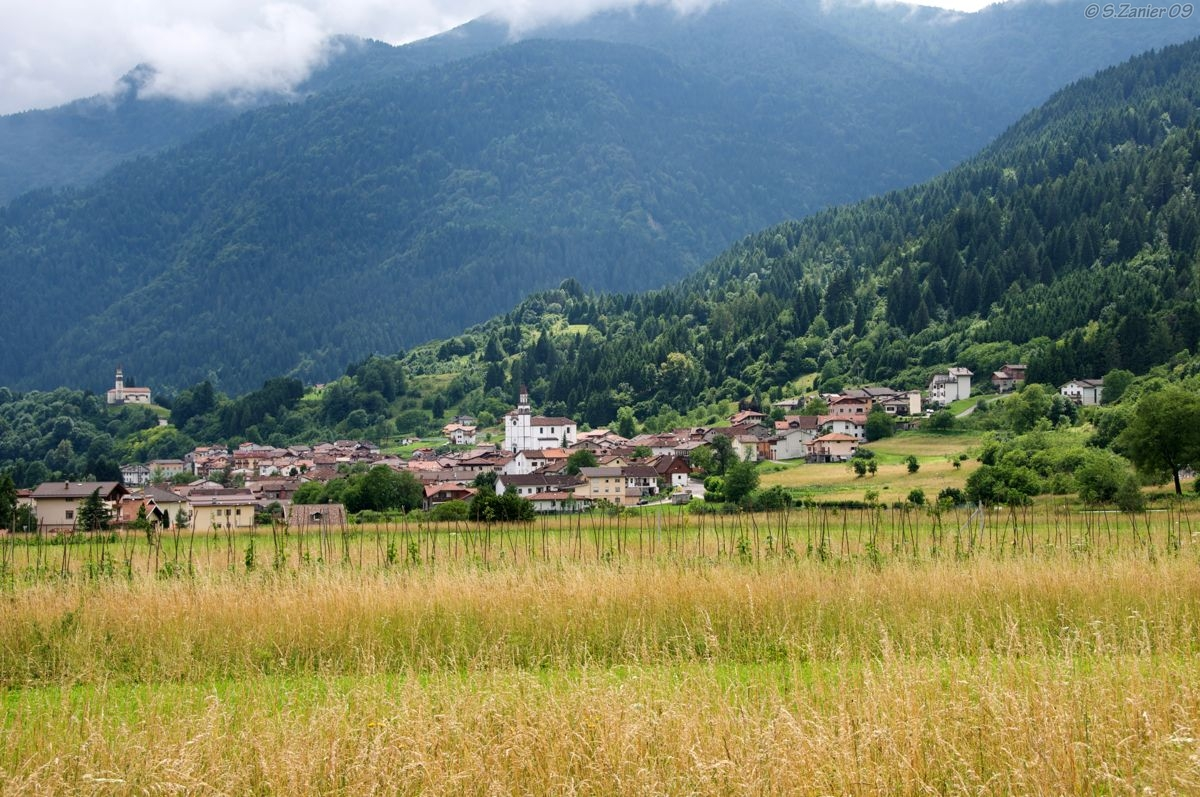 Panoramica di Sutrio